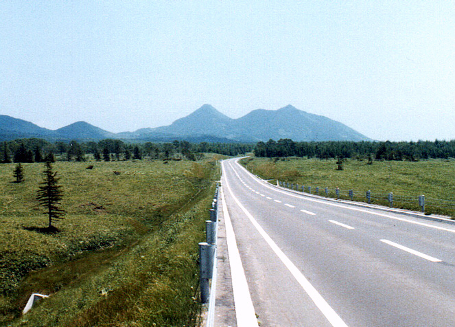 清里峠から望む北海道標津郡中標津町の温泉富士。